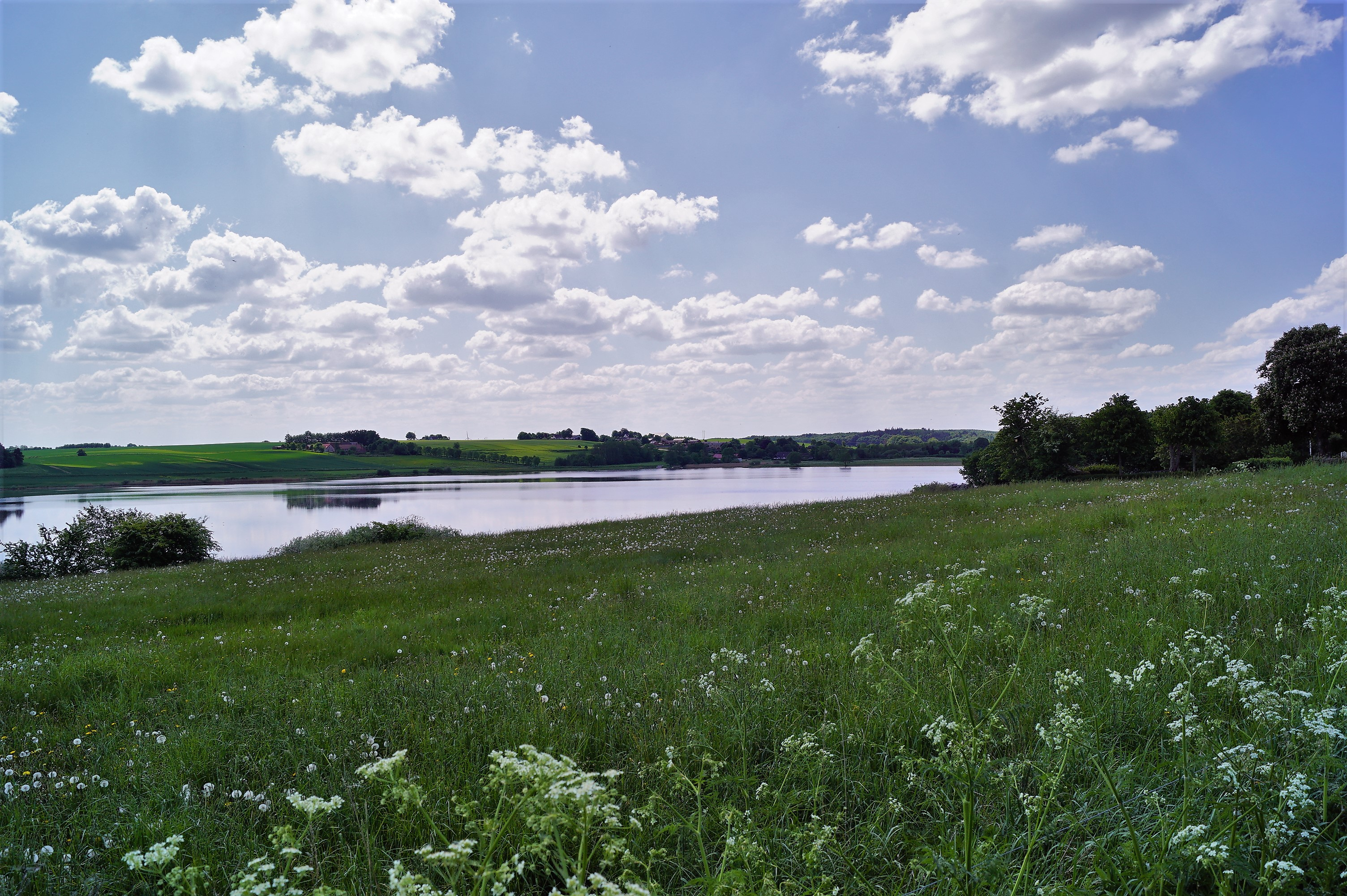 Glenstrup Sø set mod sydvest